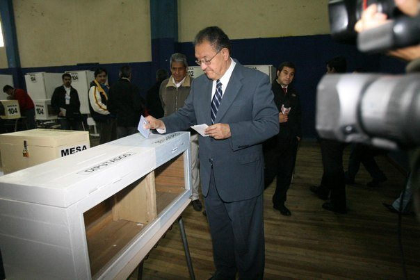 Francisco Huenchumilla, politico chileno, votando.